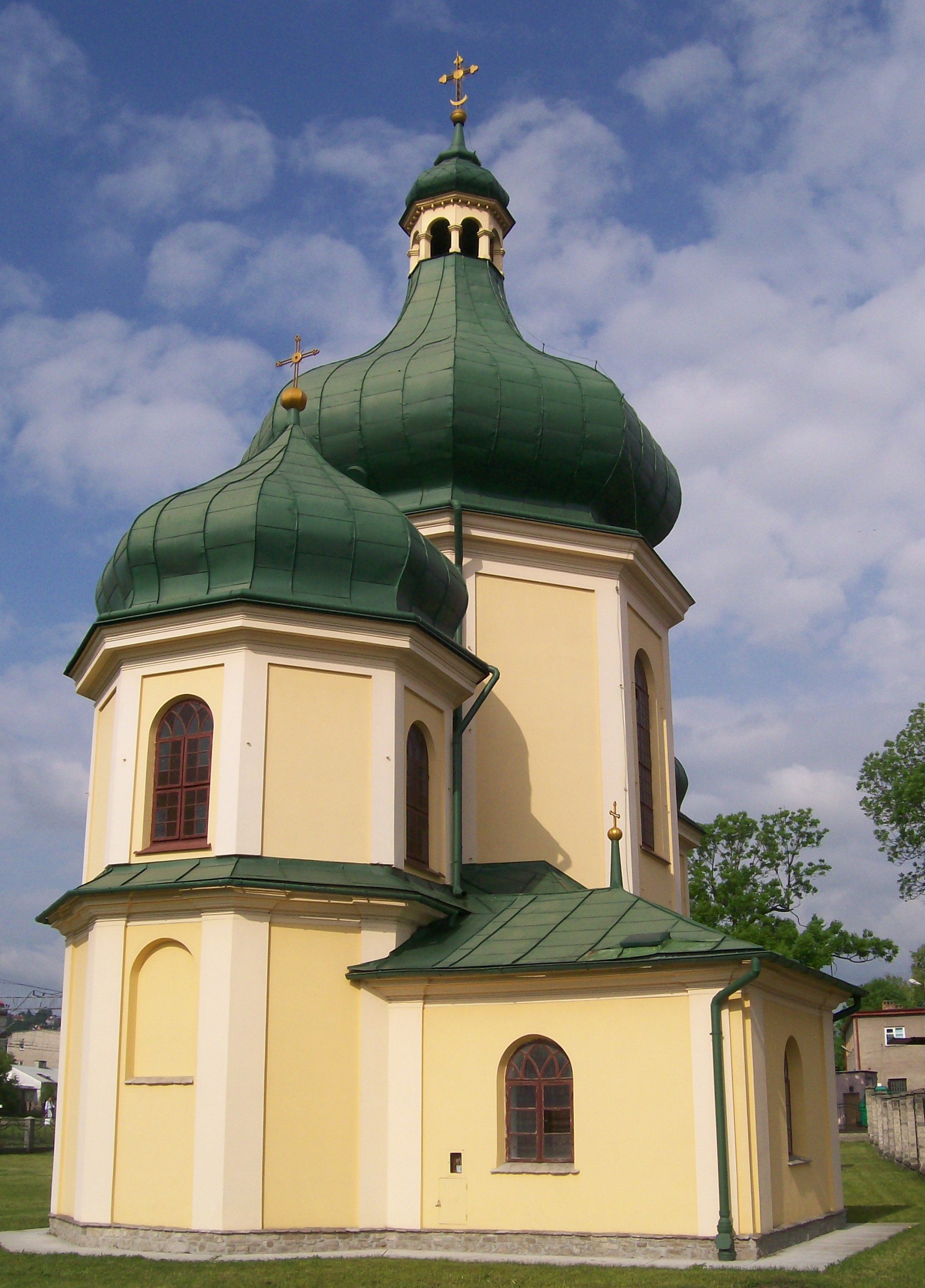 Cerkiew Narodzenia Najświętszej Maryi Panny w Przemyślu.